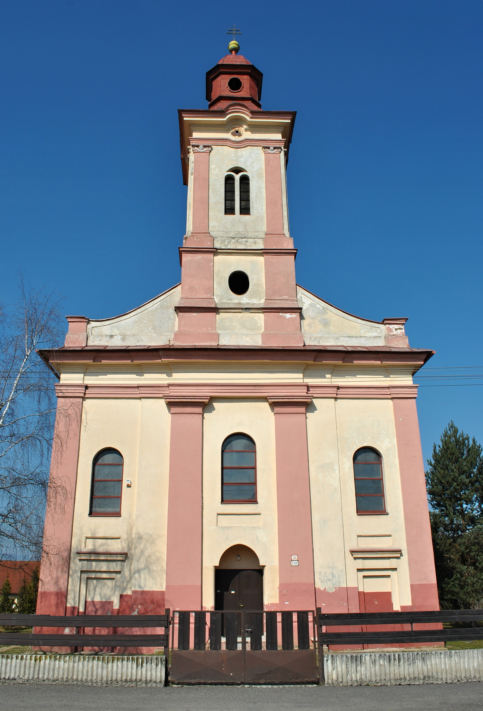 Liptovský Mikuláš, mestská časť Palúdzka - rímsko-katolícky kostol Sv. Jána Evanjelistu